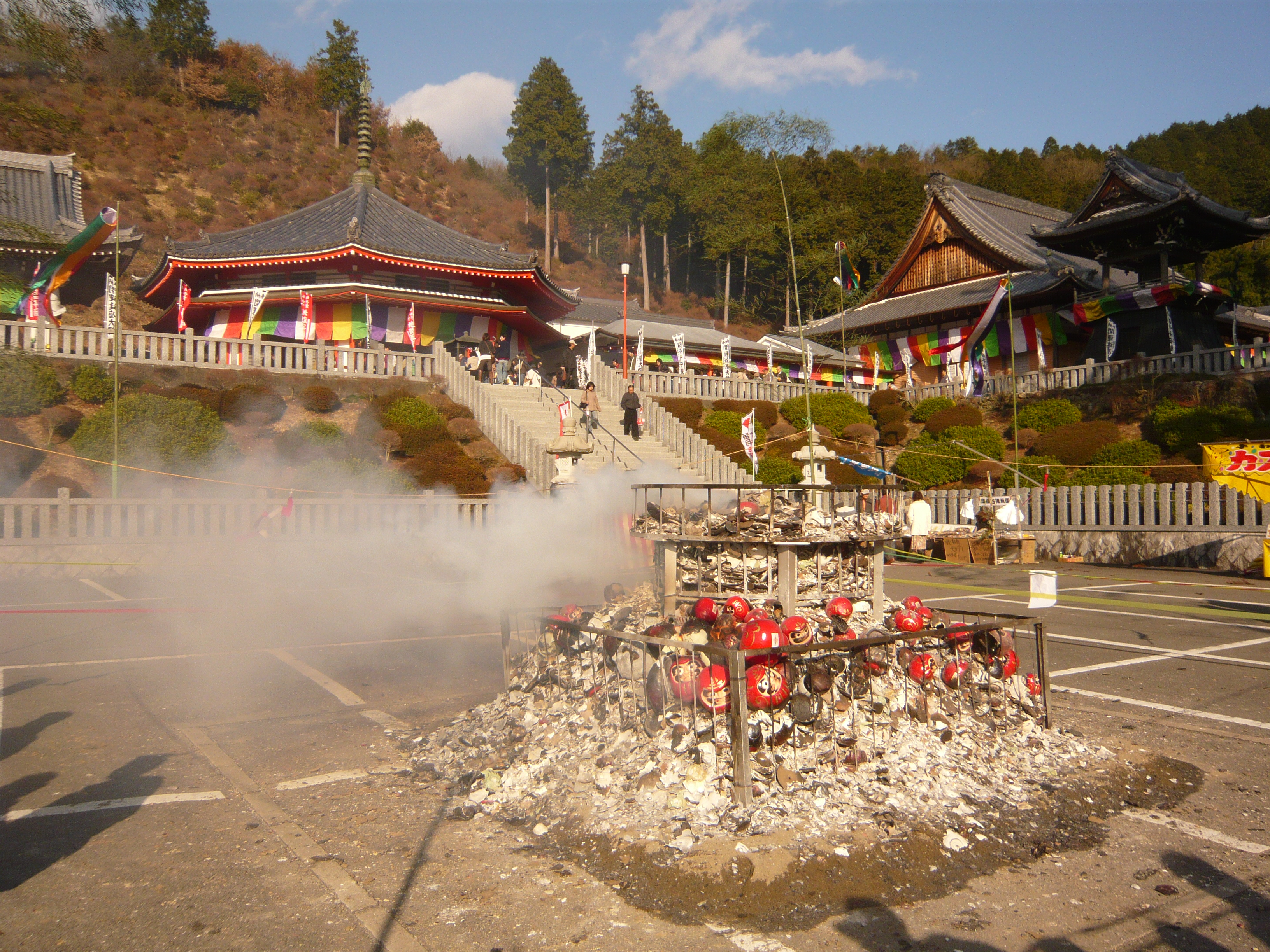 Dairyuji (Gifu) 大龍寺 (岐阜市)（大龍寺 (岐阜市)）,Gifu,Gifu,Japan（岐阜県岐阜市）で撮影。